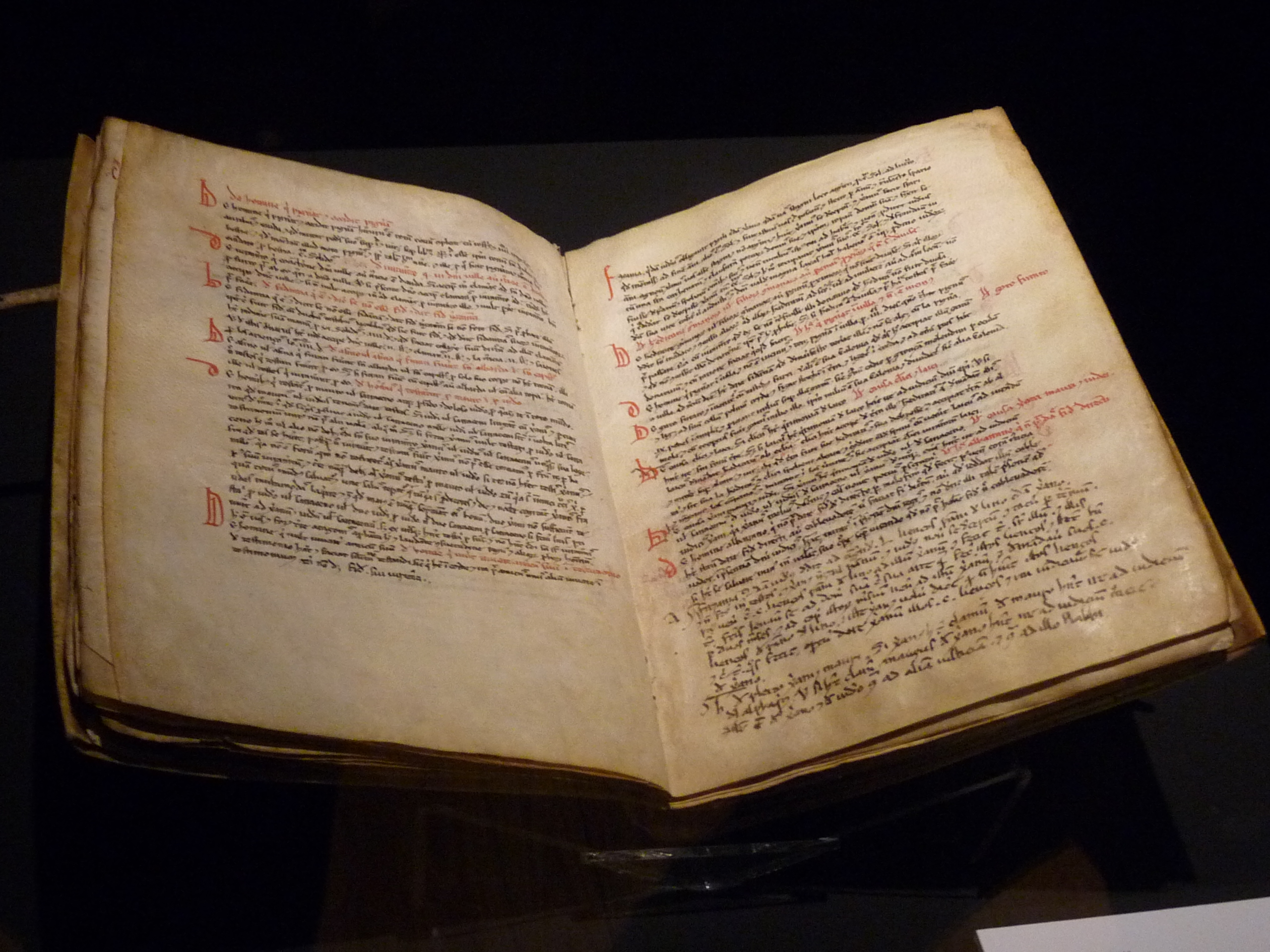 Códice Villarense [1] s. XIII - Manuscrito en vitela y papel